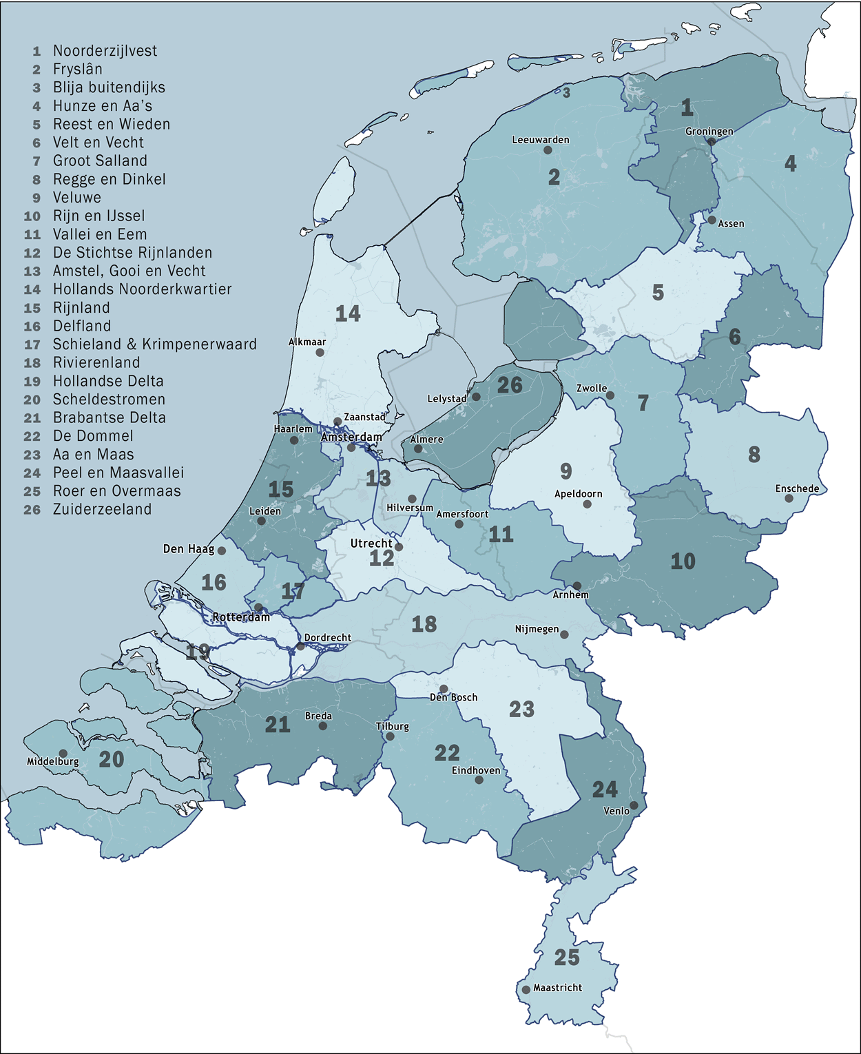 Gebiedsindeling van de Nederlandse Waterschappen, op basis van gegevens van de Unie van Waterschappen. Gerasterd in Photoshop op basis van publiekelijk beschikbare geo-data (CBS, Unie van Waterschappen)